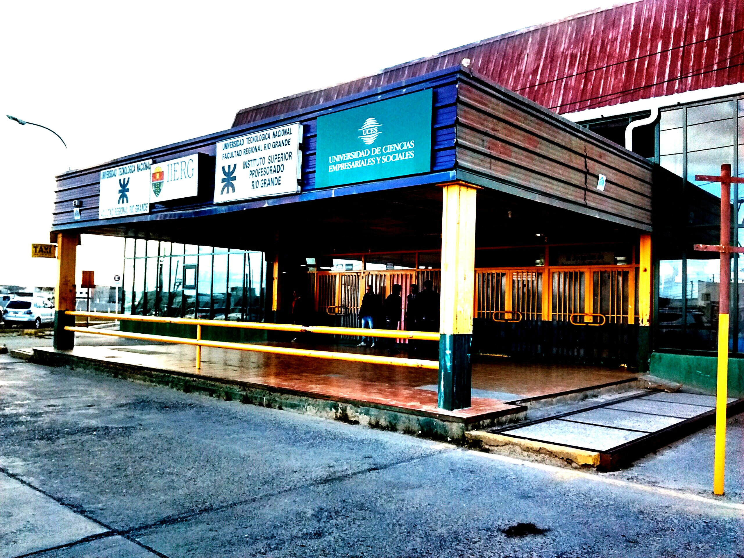 Instituciones que funcionan junto a la UTN en el mismo edificio